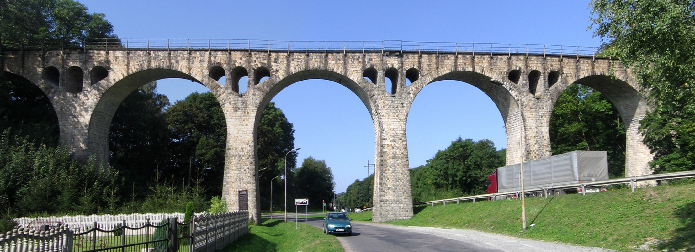 Lewin Kłodzki, wiadukt Kolejowy od strony wschodniej